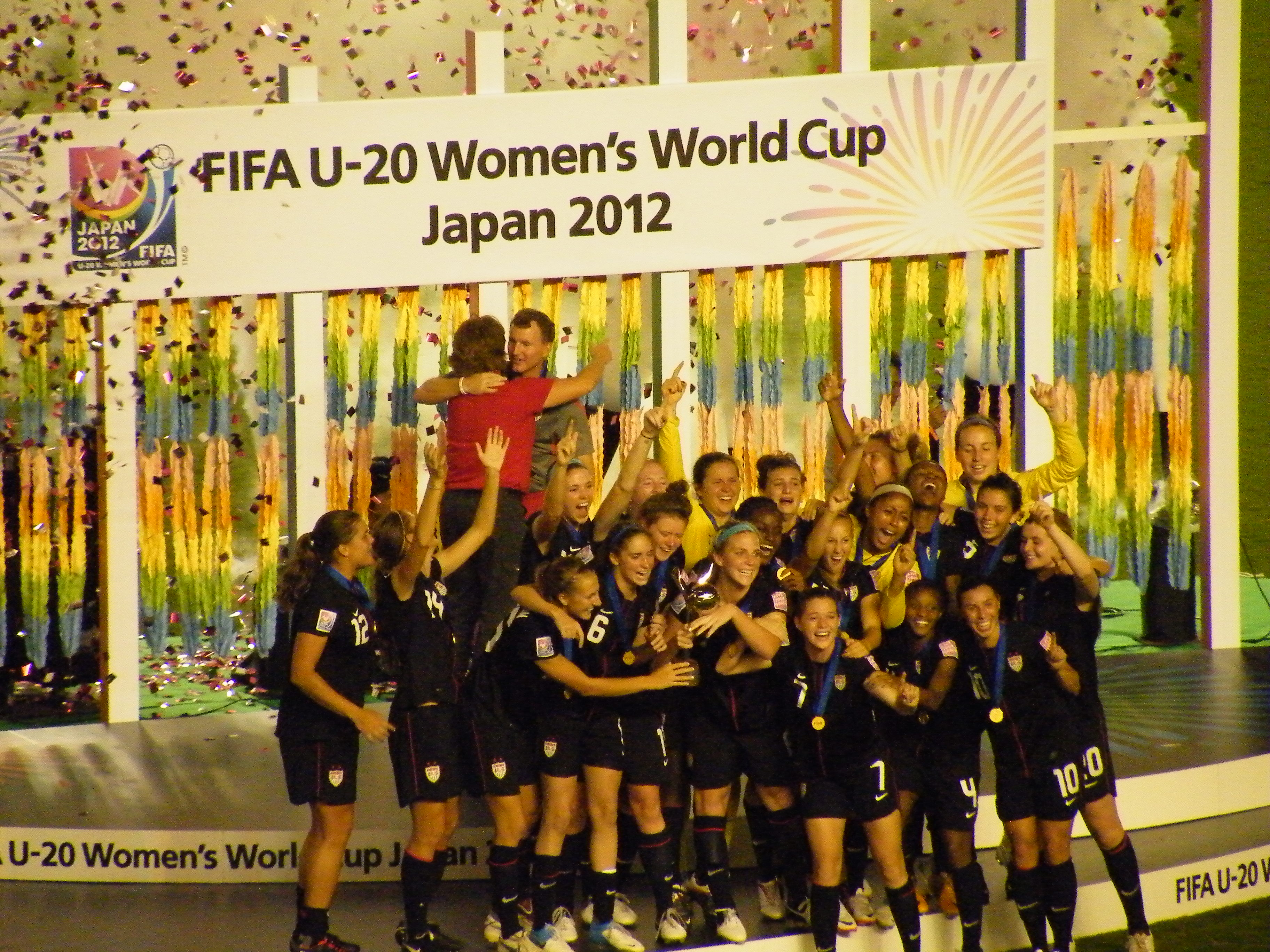 2012 FIFA U-20 Women's World Cup Commendation Ceremony. (United States women's U-20 team)